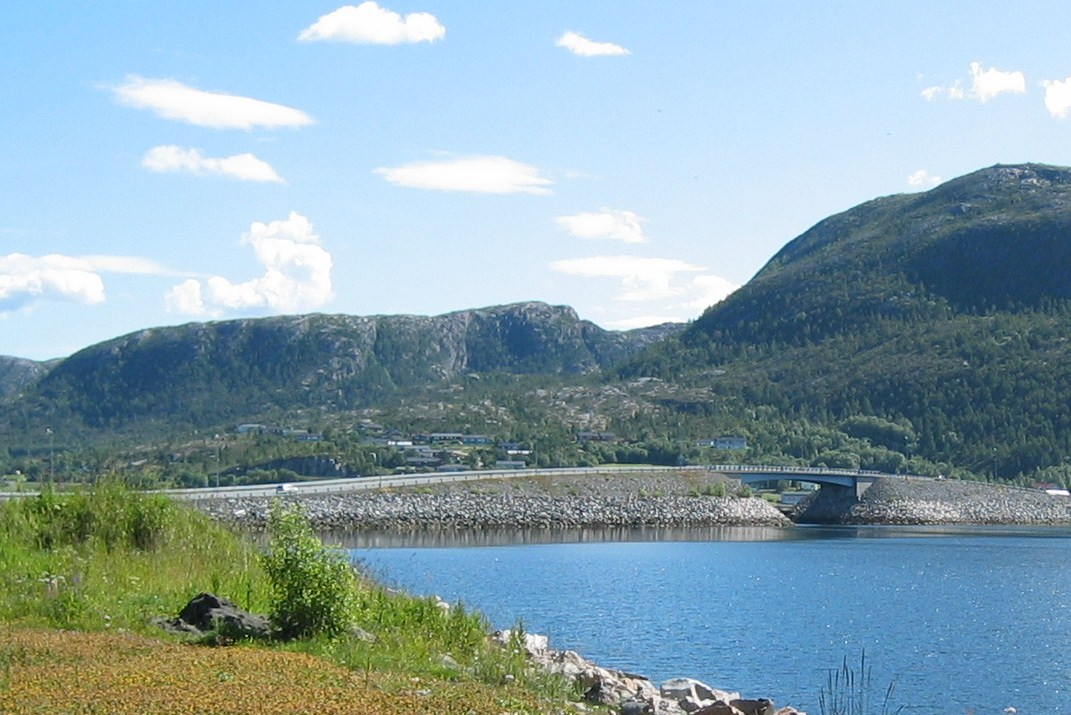 Hemnskjelbrua, Snillfjrod, Norway